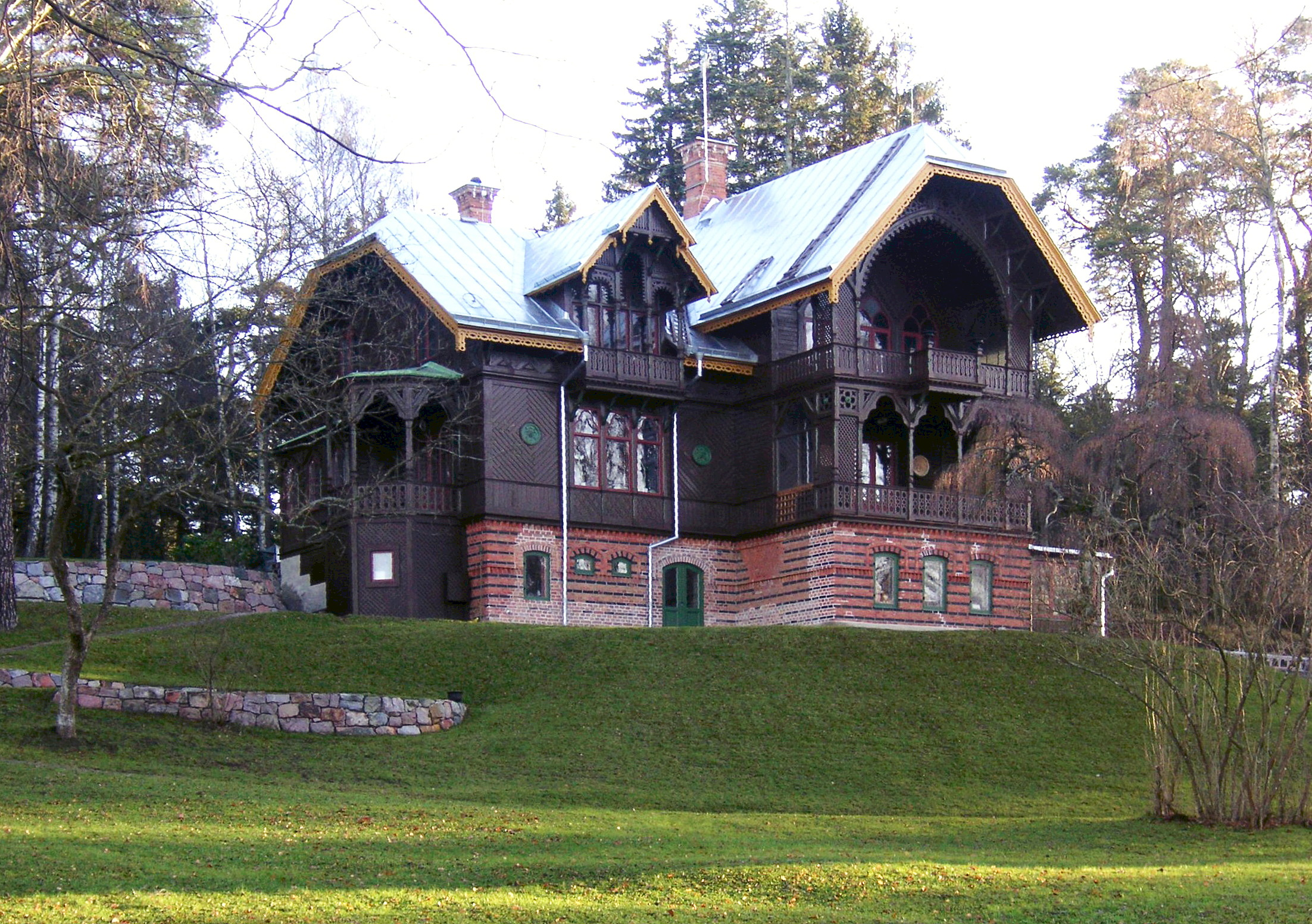 Villa Skogsborg på Ulriksdals slottsområde